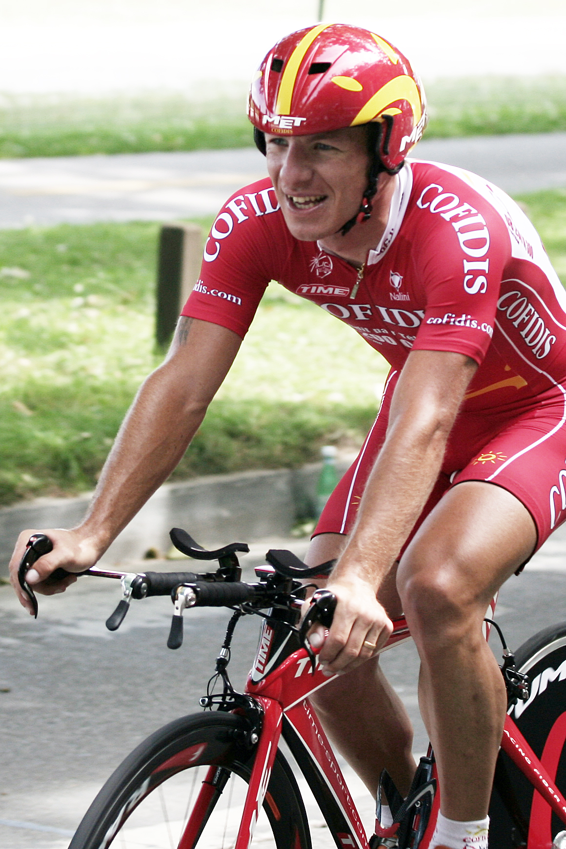 Steve Zampieri, Bern, Switzerland (Einzelzeitfahren Tour de Suisse 2007)